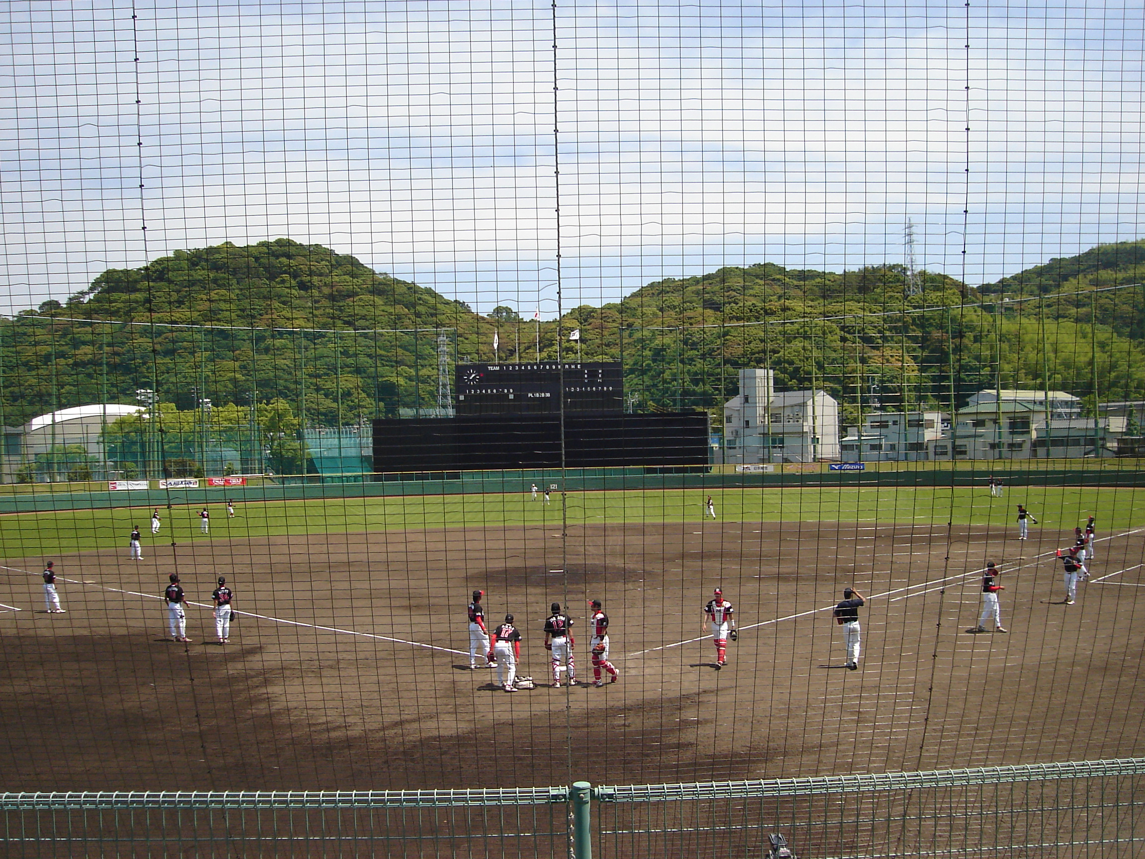 高知市野球場。 - 日本国高知県高知市にある野球場。